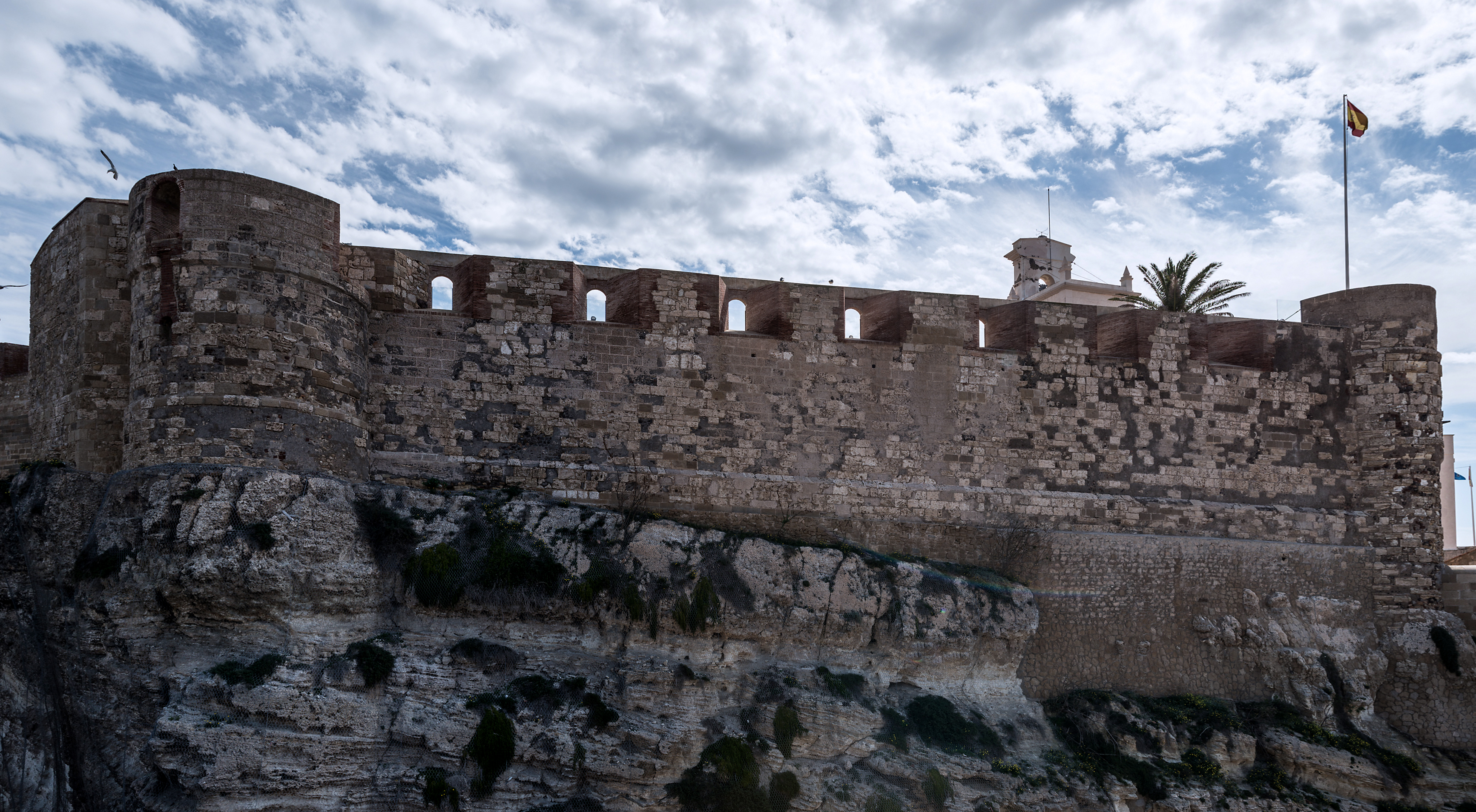 La Muralla Real es una antigua batería artillada situada en Melilla la Vieja, en la ciudad española de Melilla, a la que se accede desde la Torre de la Vela y forma parte del Conjunto Histórico Artístico de la Ciudad de Melilla, un Bien de Interés Cultural.